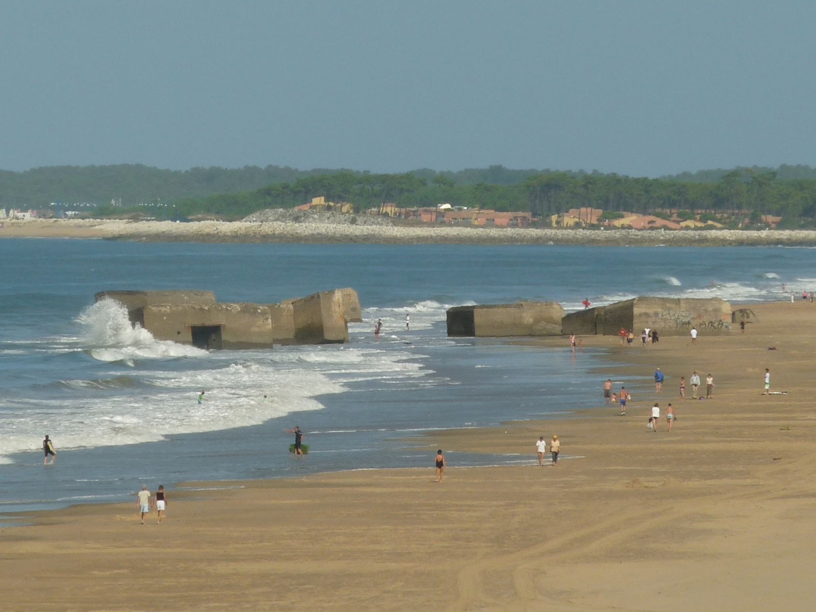 La Grande-Côte à St-Palais-sur-Mer (17), France. Blockhaus descendus de la dune.